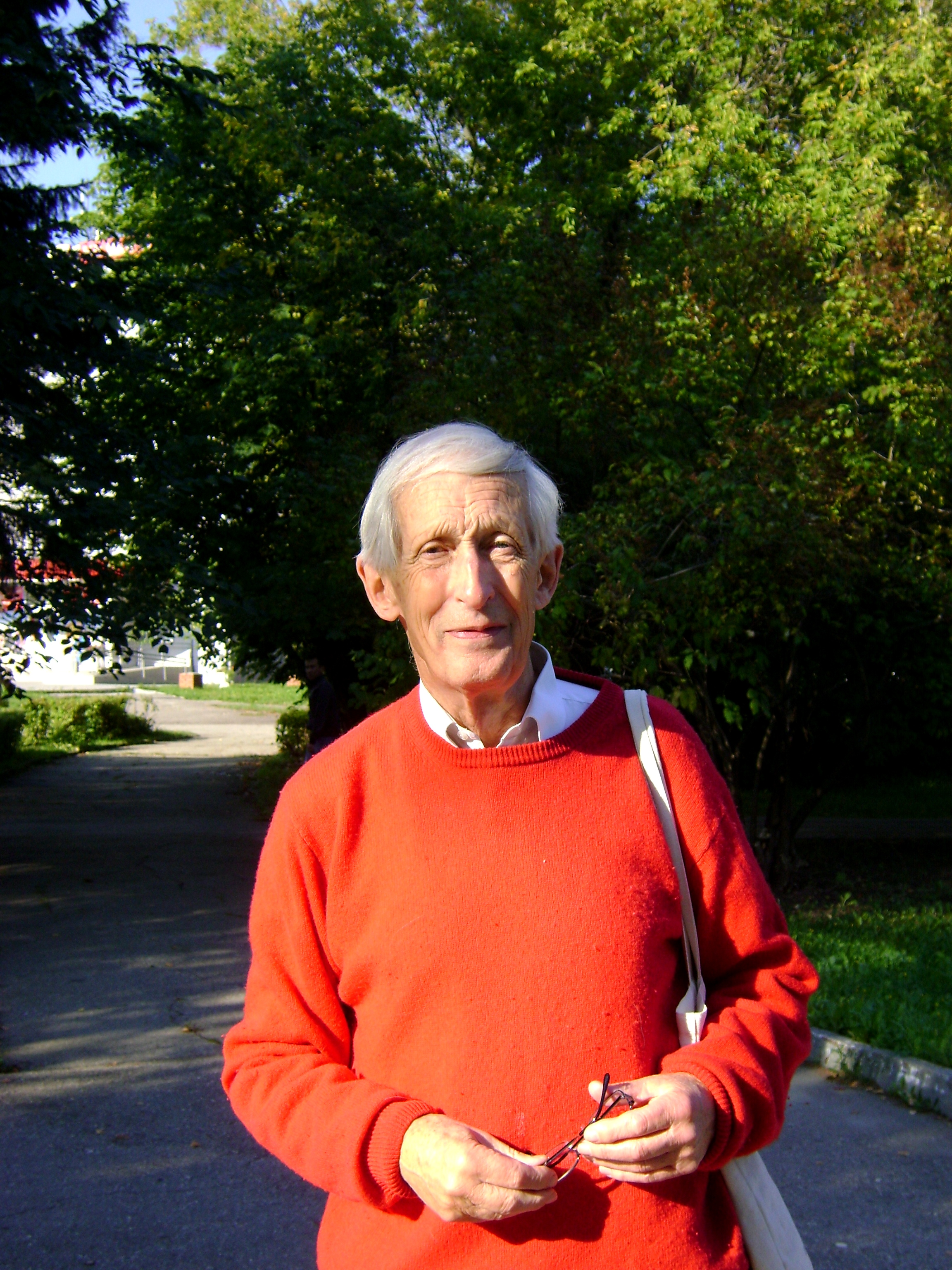 Питер Франс. Чебоксары, 13 сентября 2014 года.